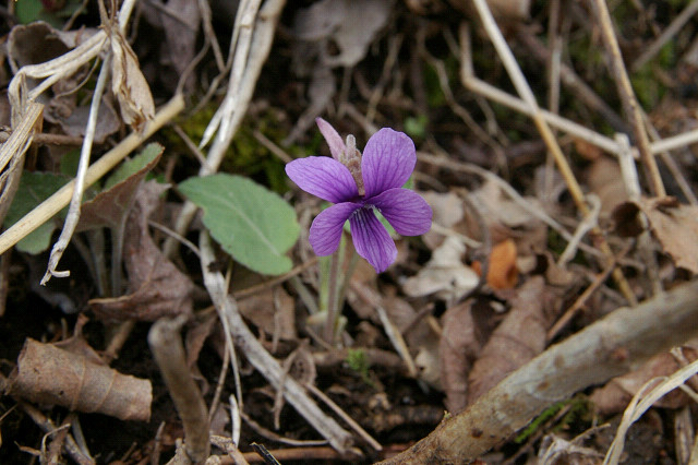 アカネスミレ （山梨県山中湖村）Viola phalacrocarpa (Yamanakako-Village, Yamanashi, JAPAN)